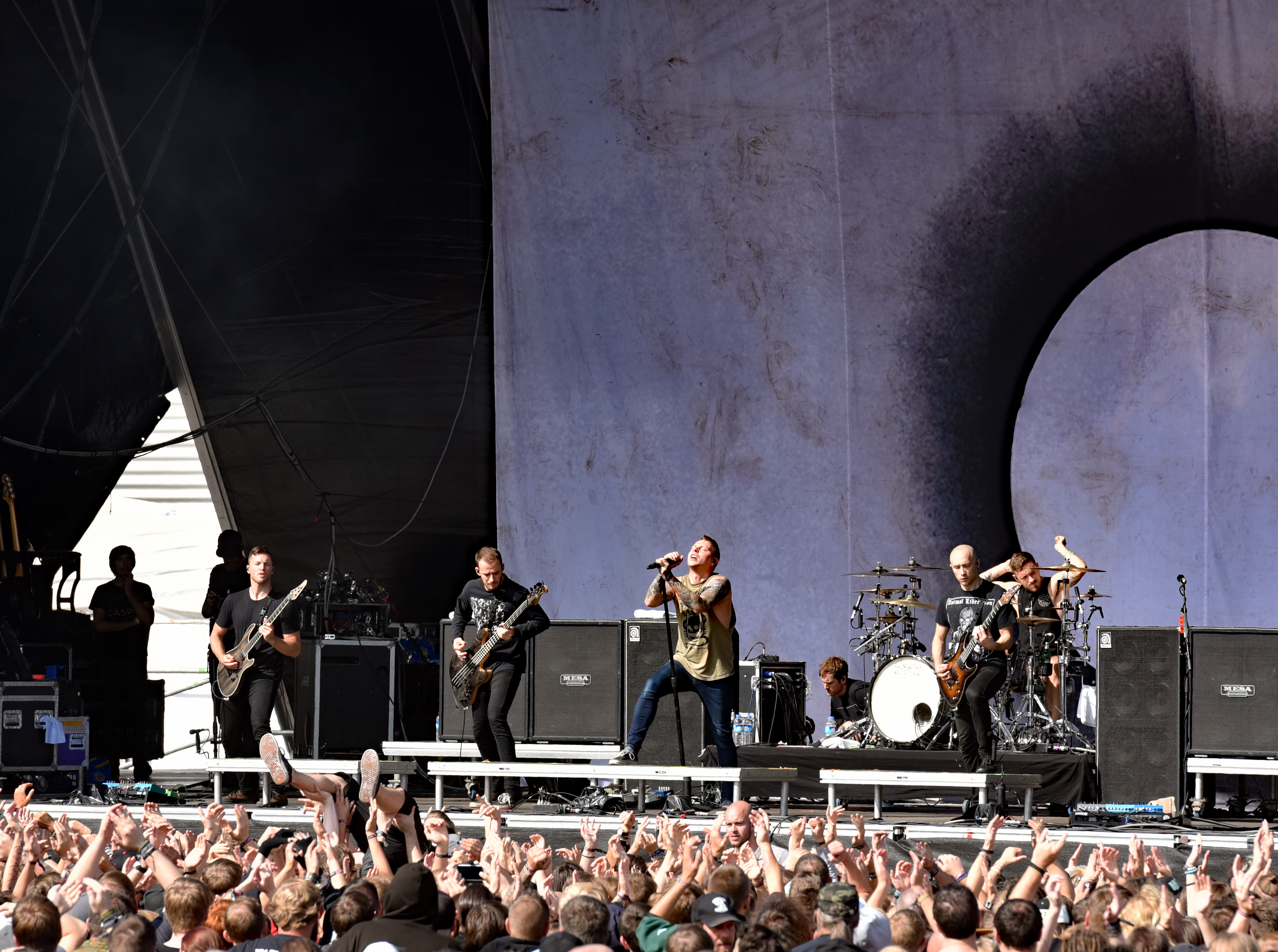 Architects beim Elbriot 2017